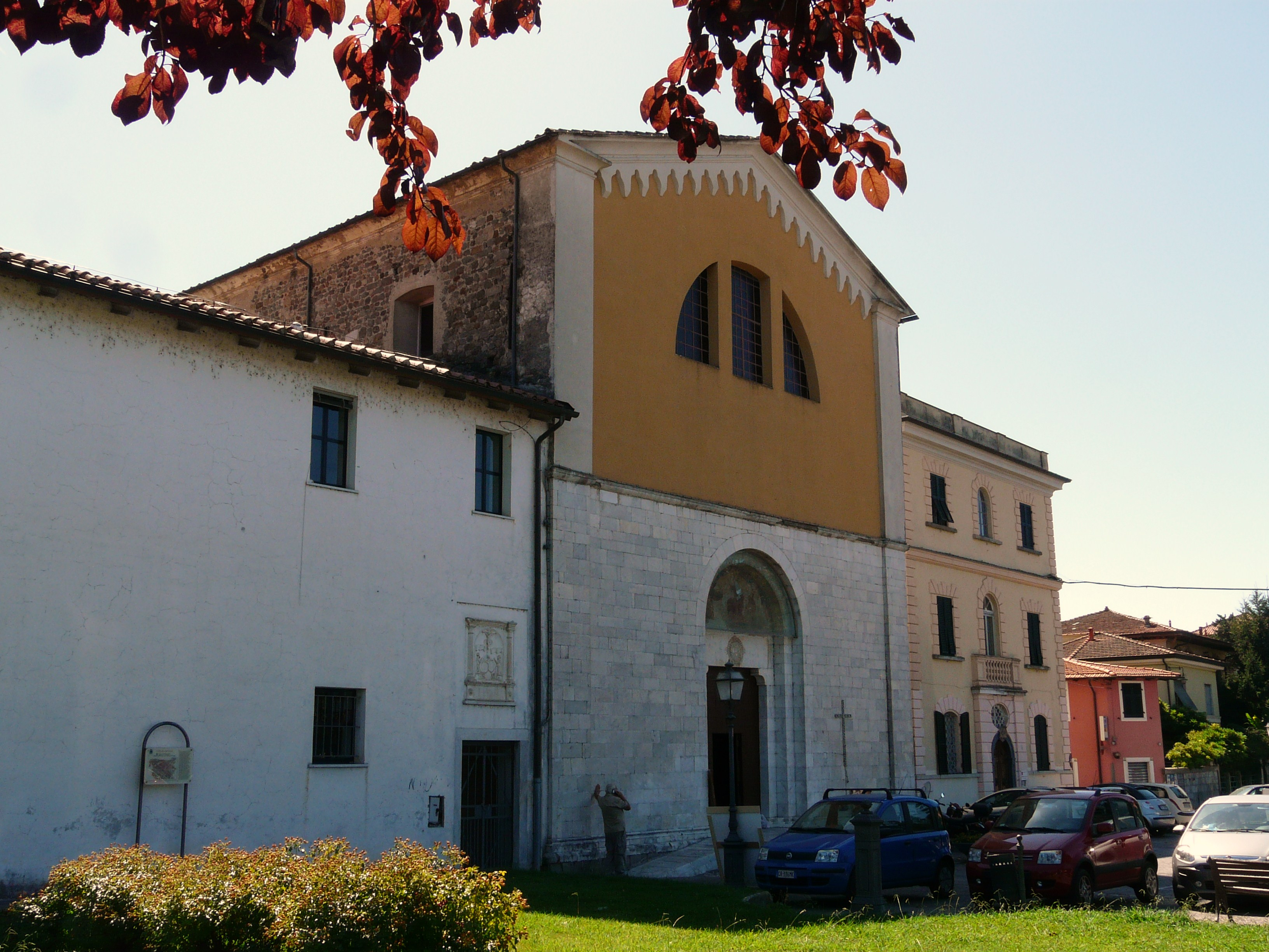 Chiesa, convento e chiostro di San Francesco, Sarzana, Liguria, Italia